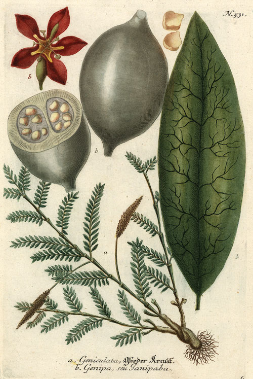 a. Geniculata - Glieder Kraut = ? (any Gliedkraut?) *b. Genipa, seu Ianipaba = Genipa americana